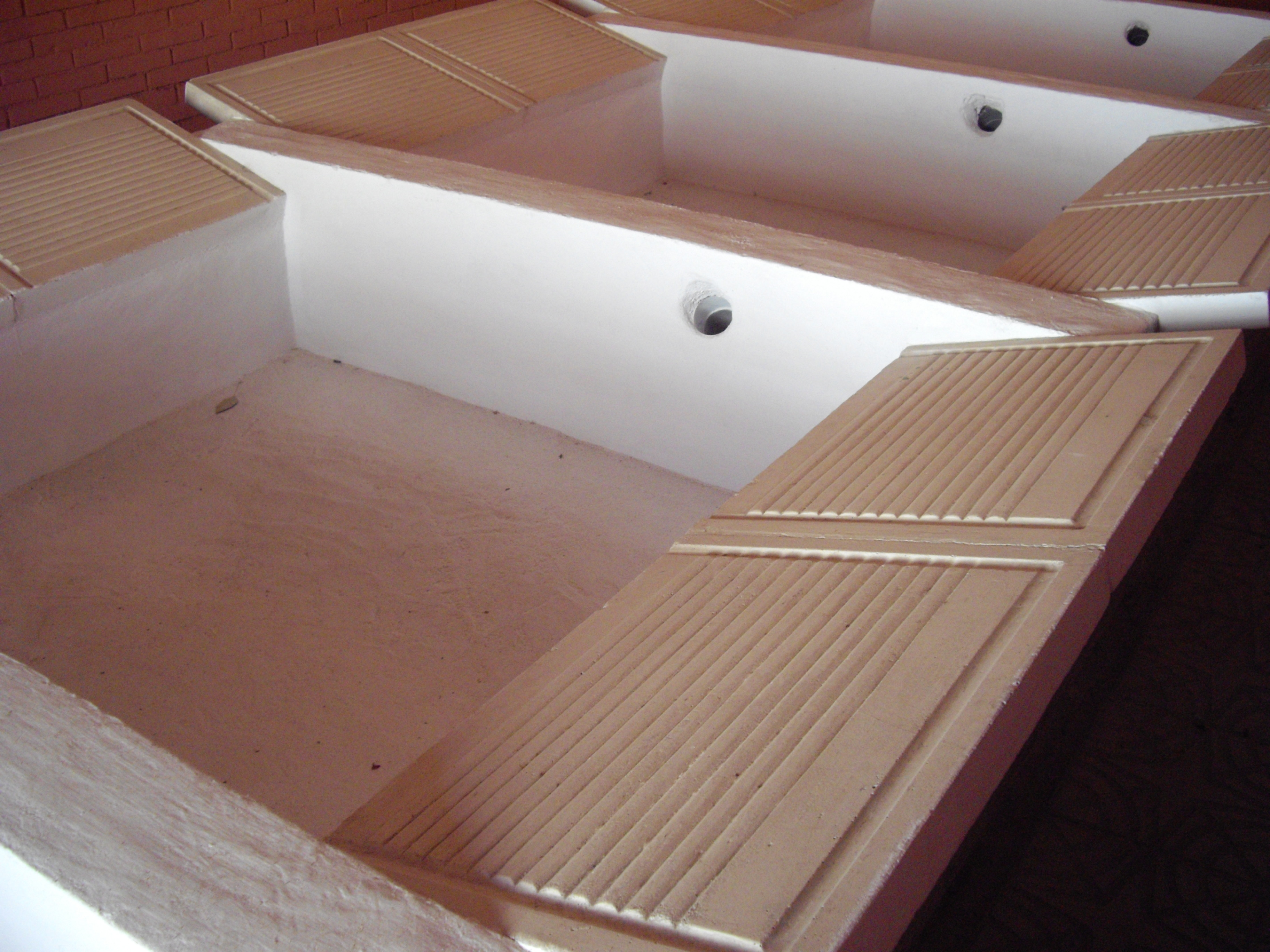 Vista del lavadero público de Puerto Lumbreras